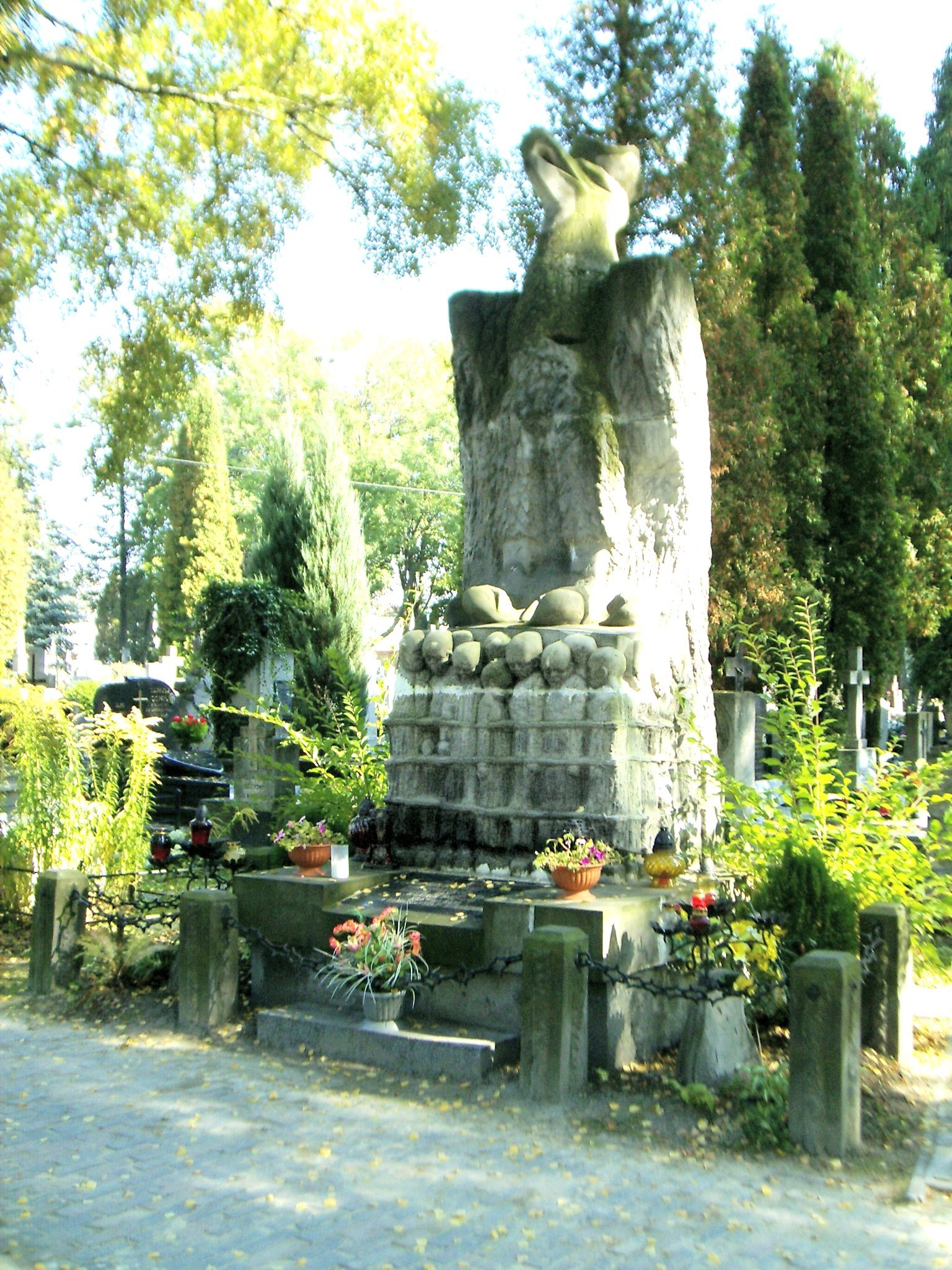 Pomnik poświęcony Dzieciom Zamojszczyzny